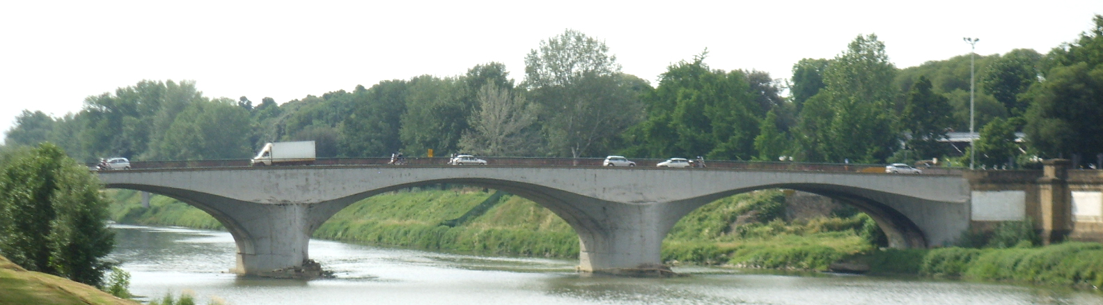 Ponte della vittoria